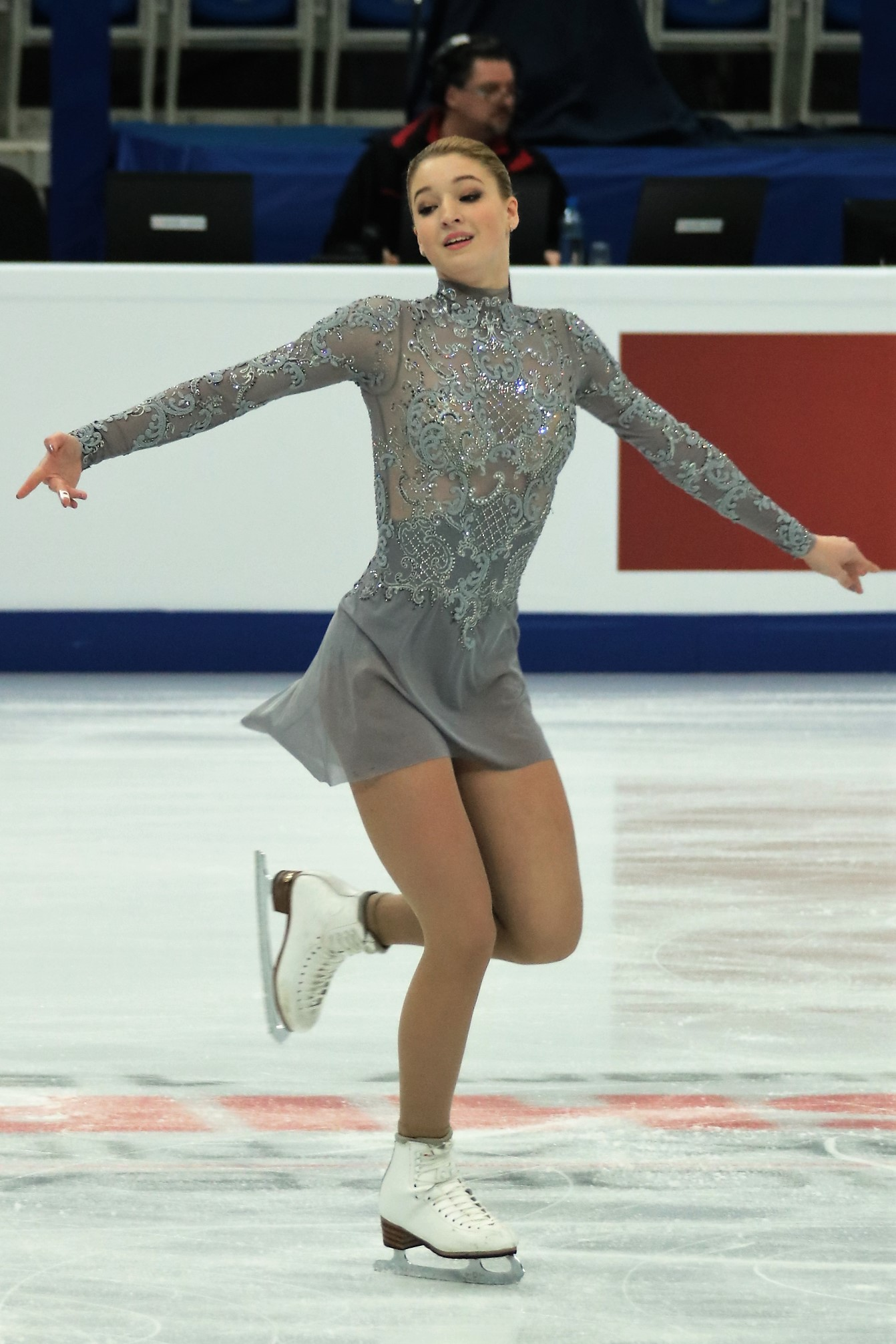 Мария Сотскова (Россия) на Чемпионате Европы по фигурному катанию 2018.